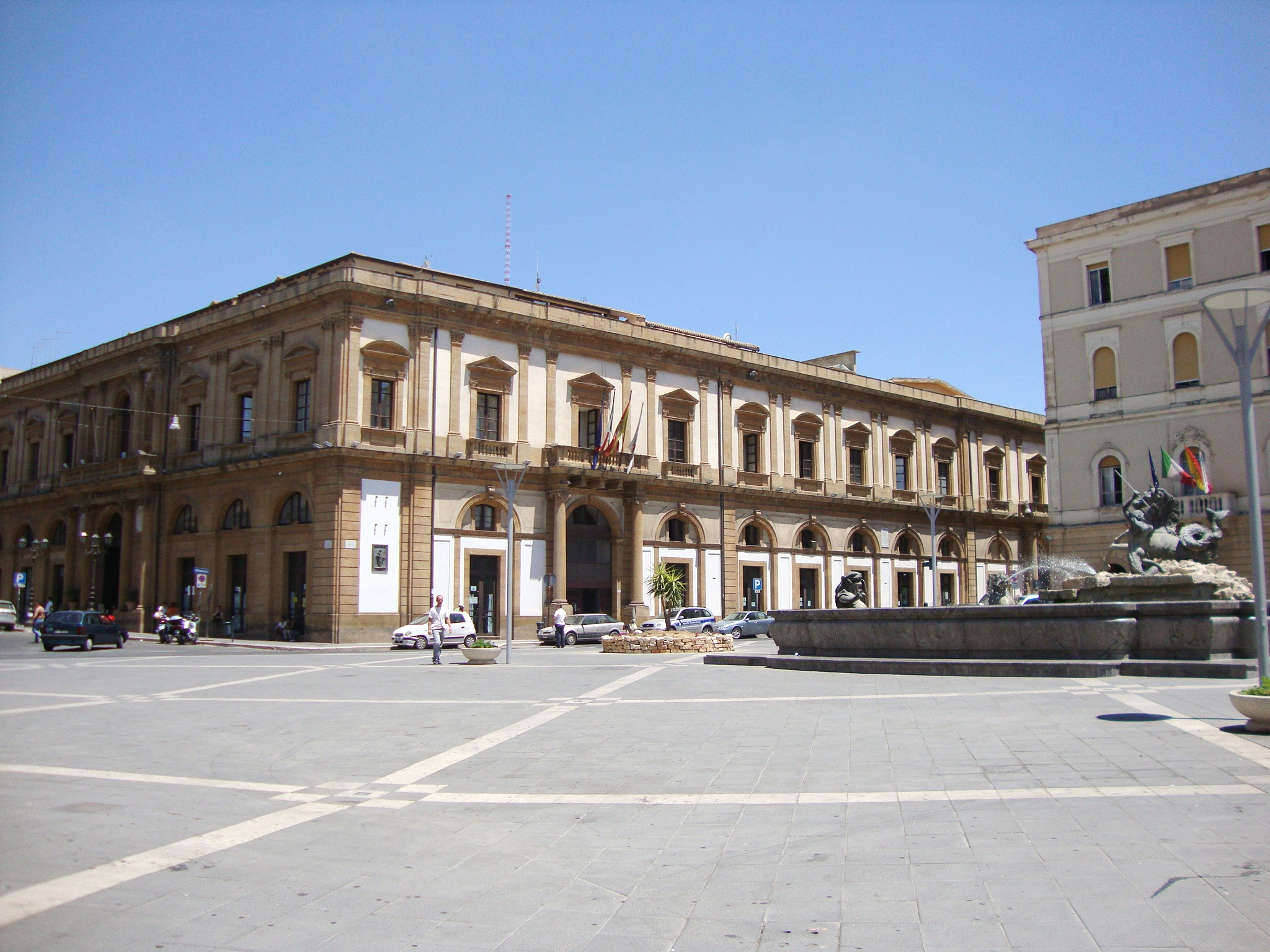 Veduta panoramica di Palazzo del Carmine di Caltanissetta; foto scattata in Caltanissetta in data 9/07/2010; autore Isider93